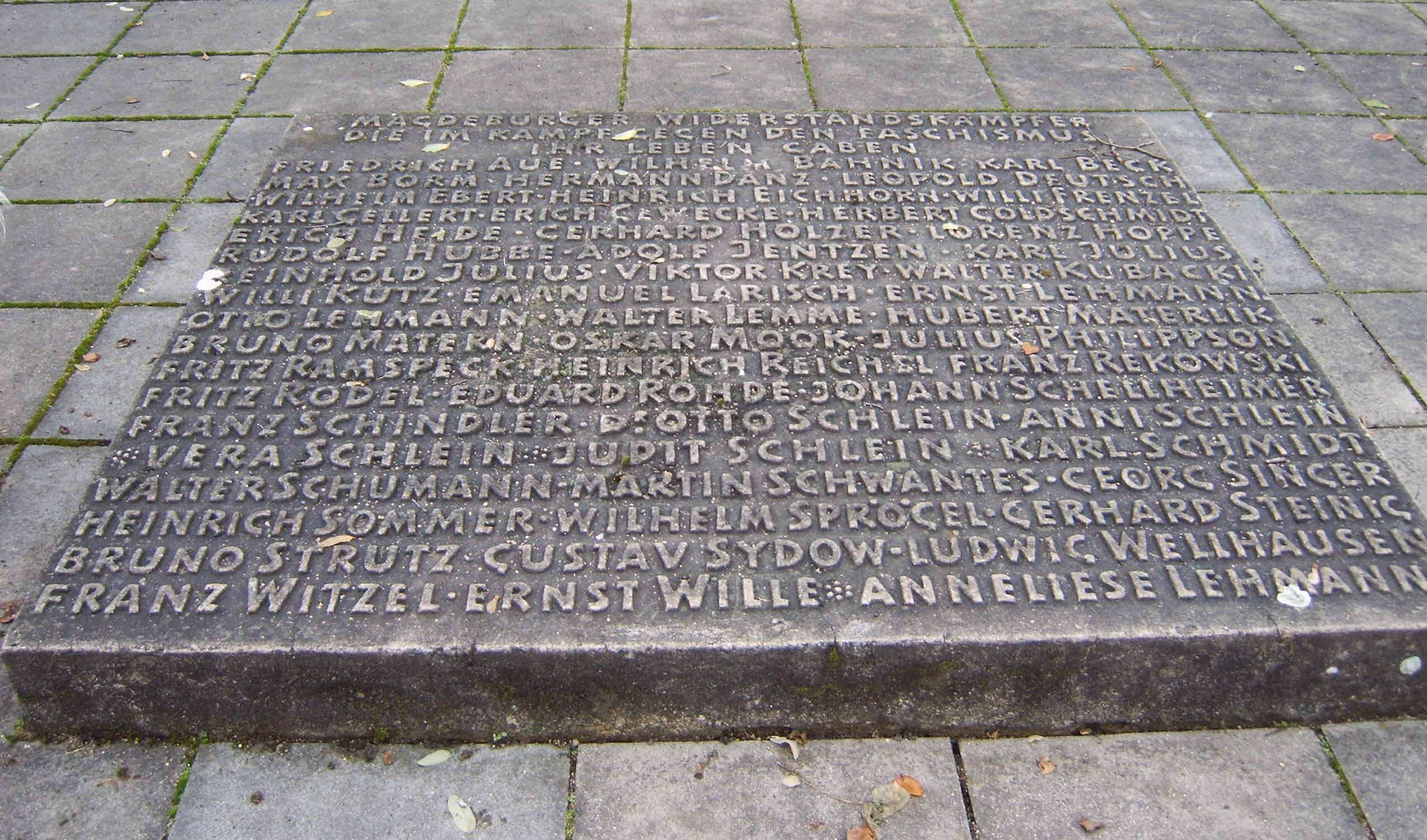 Gedenkstein im Mahnmal für die Magdeburger Widerstandskämpfer